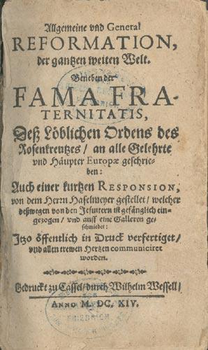 Première page de l'édition originale de la Fama Fraternitatis, année 1614.